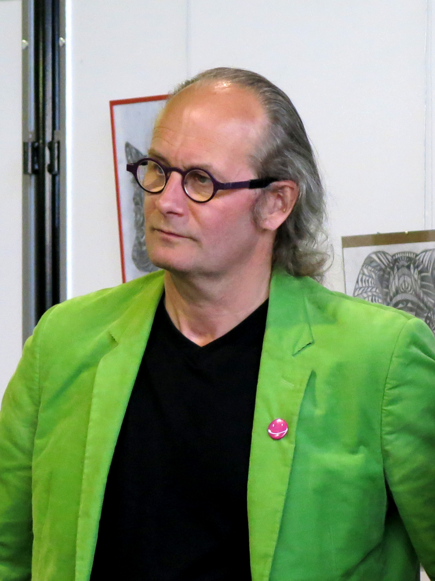 Den Europa-Deputéierte Claude Turmes beim Vernissage vu "Jukowo Jugendkonschtwoch 2014", am 1535°C zu Déifferdeng.